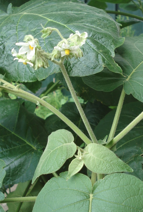 Blüten und Blätter von Solanum abutiloides